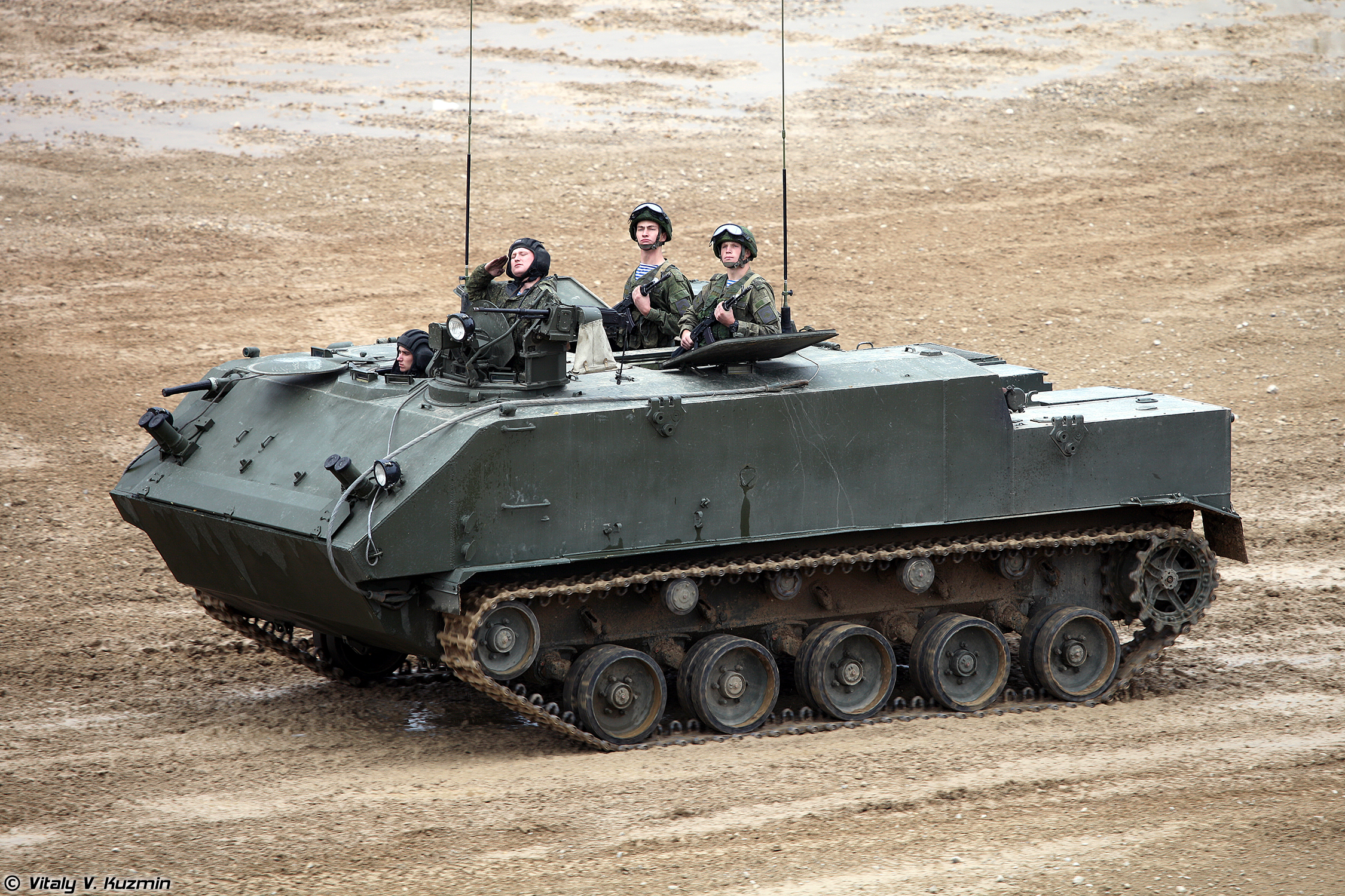 Бронетранспортер БТР-МДМ (BTR-MDM armored personnel carrier)